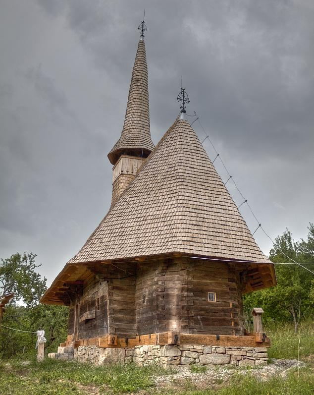 Biserica de lemn din Măgura, judeţul Sălaj.